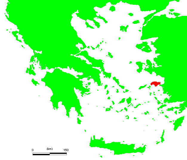 GR Samos.PNG (Greek island)